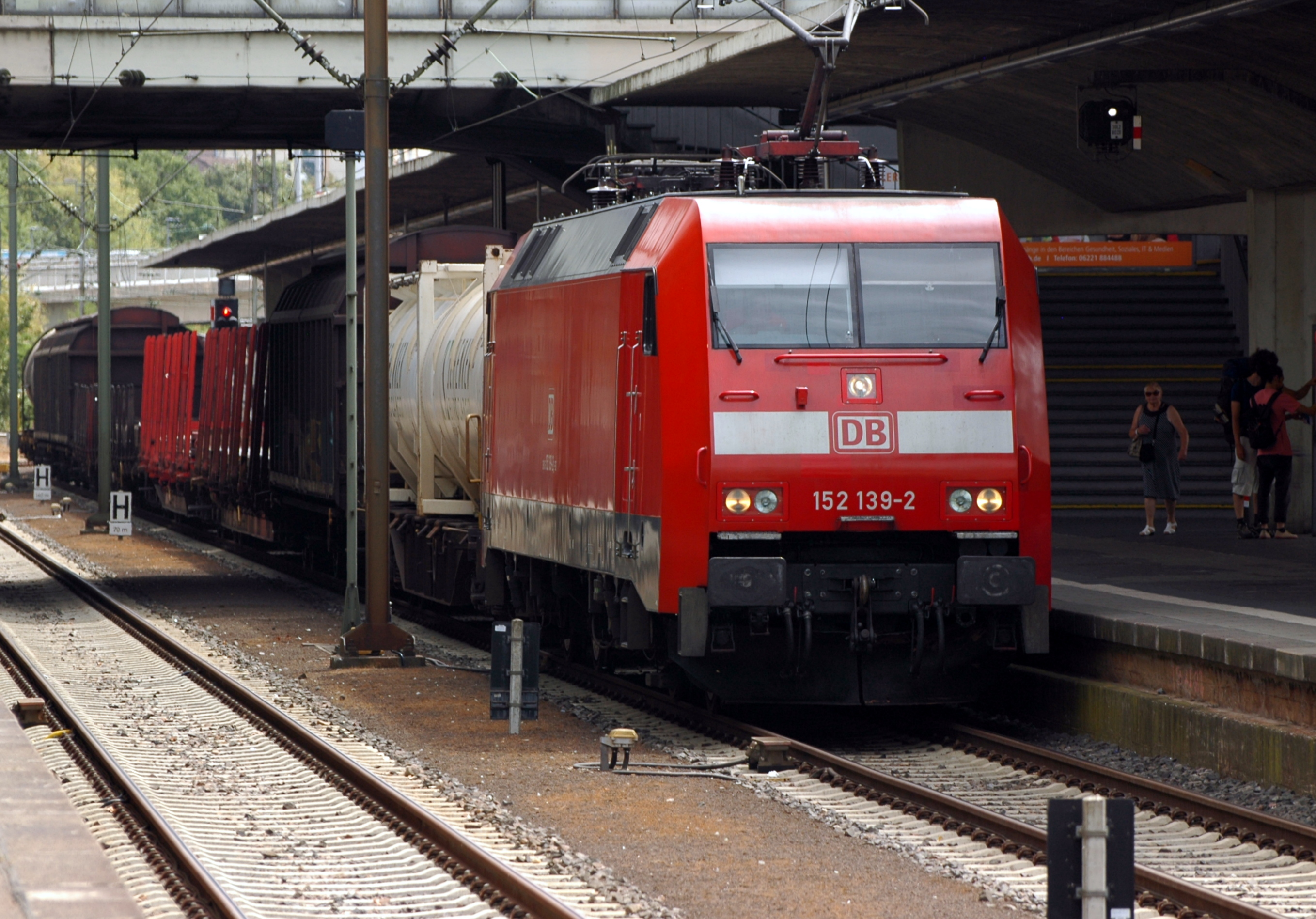 Heidelberg Hauptbahnhof - Siemens ES64F 152